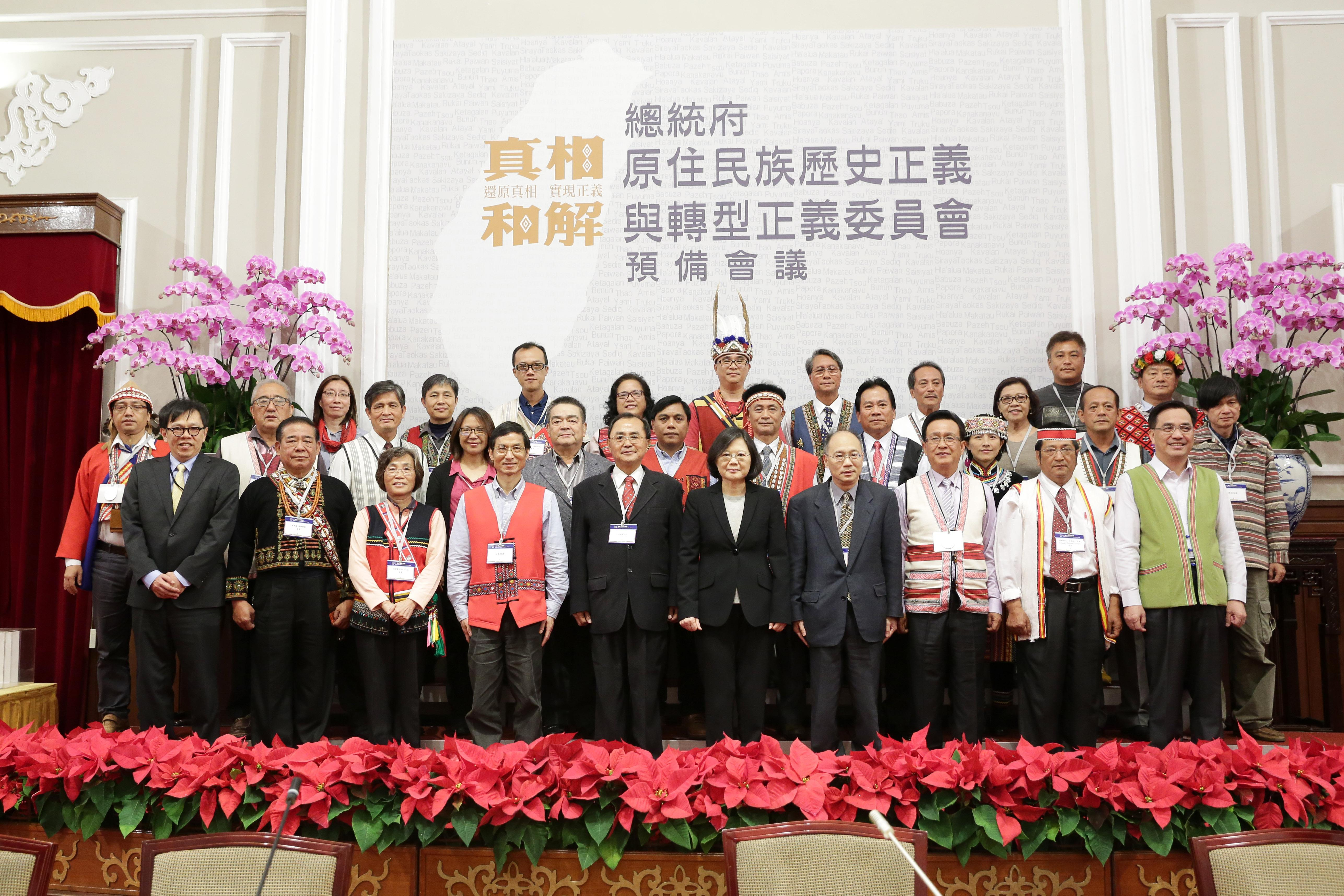 中華民國總統蔡英文出席「總統府原住民族歷史正義與轉型正義委員會預備會議」，並和與會者合影。